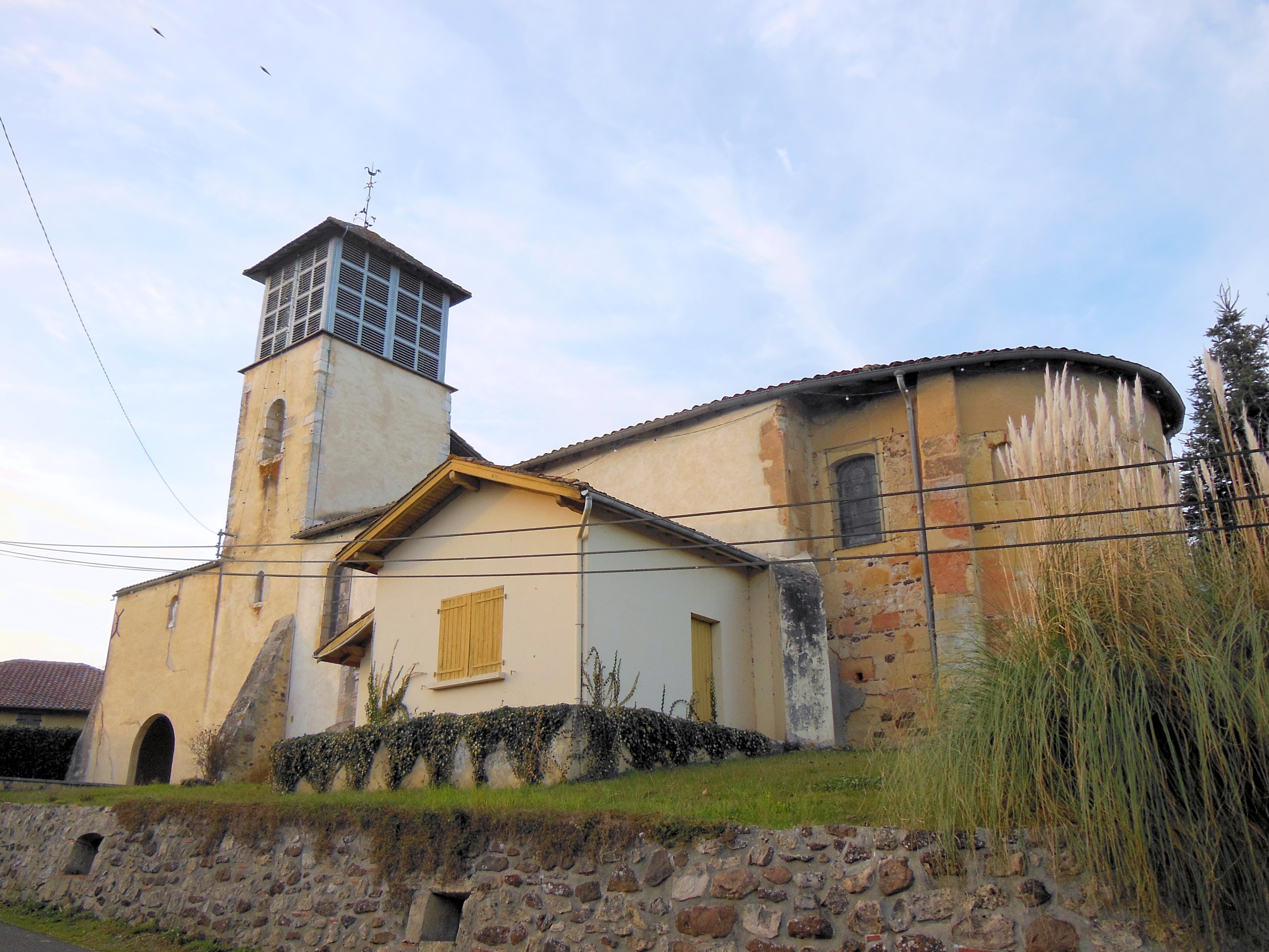 Eglise de Bahus-Juzan Montsoué (Landes, France)